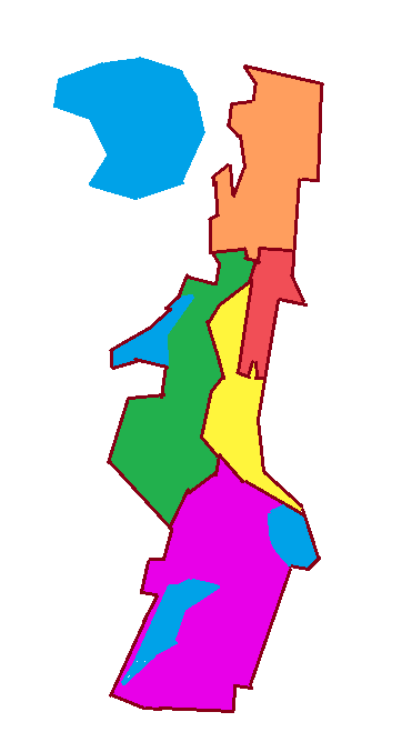 территориальные округа в городе Миасс